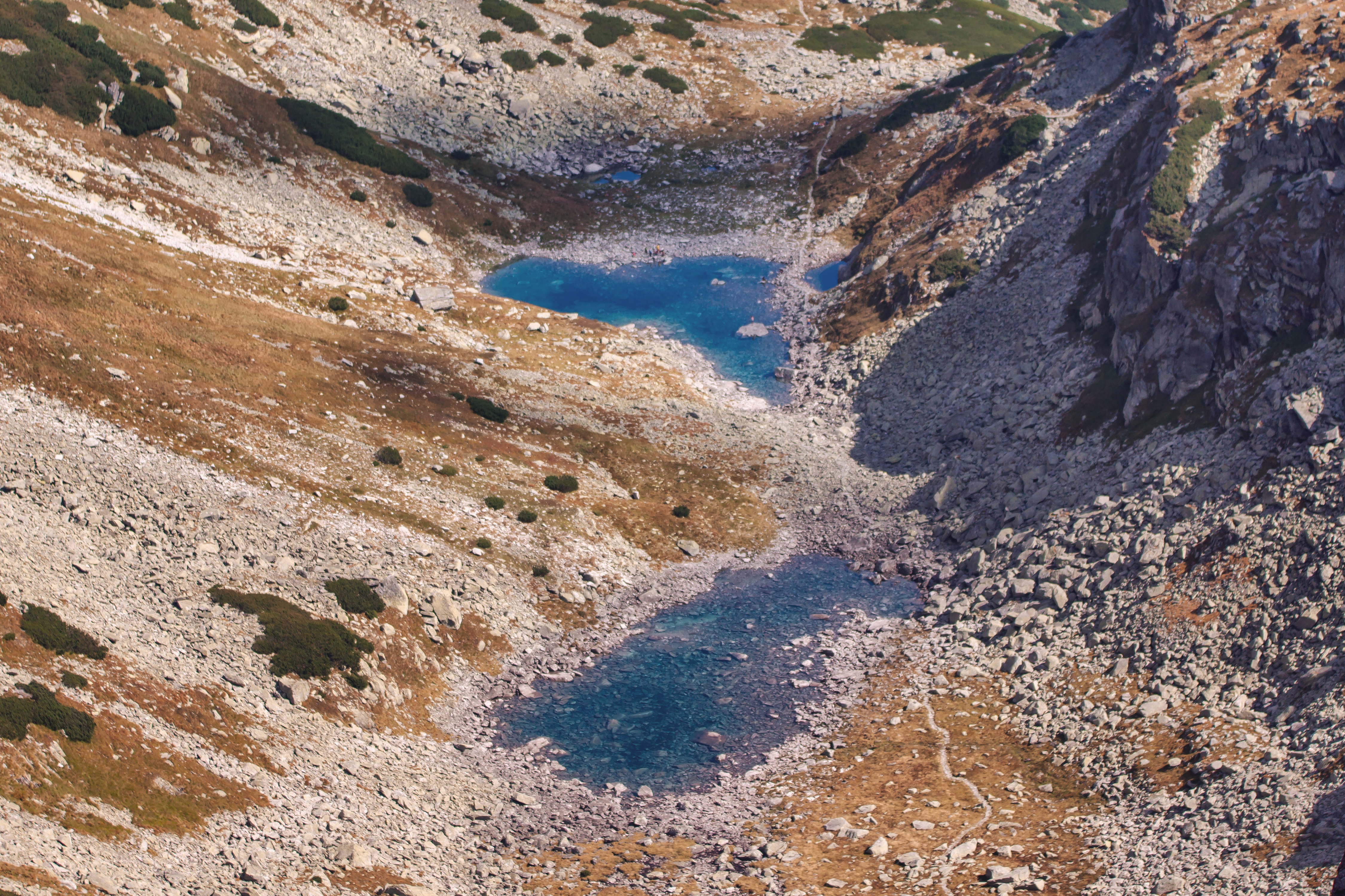 Park narodowy: Tatrzański Park Narodowy This is a photography of protected area with CRFOP ID PL.ZIPOP.1393.PN.14